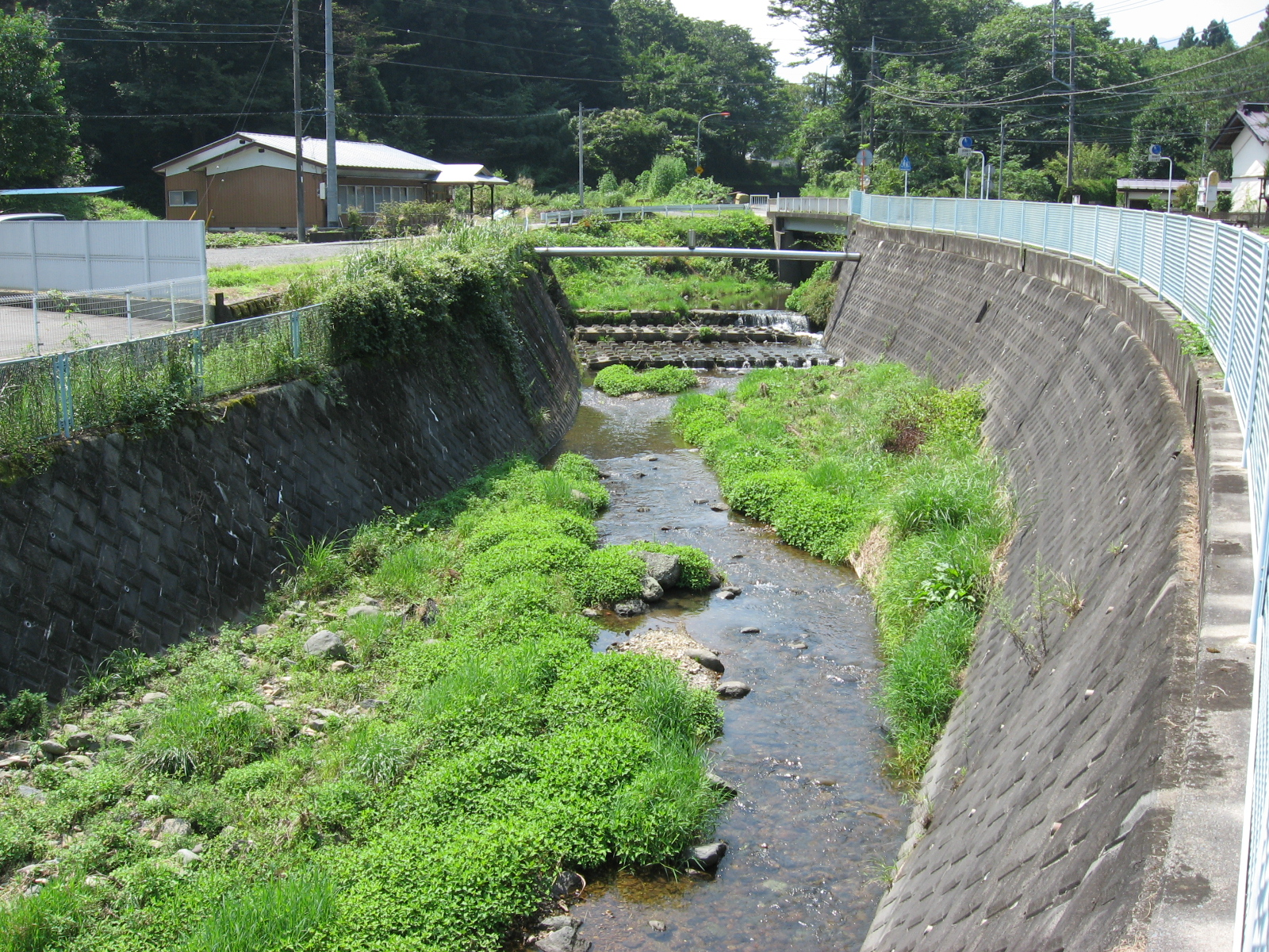 串川